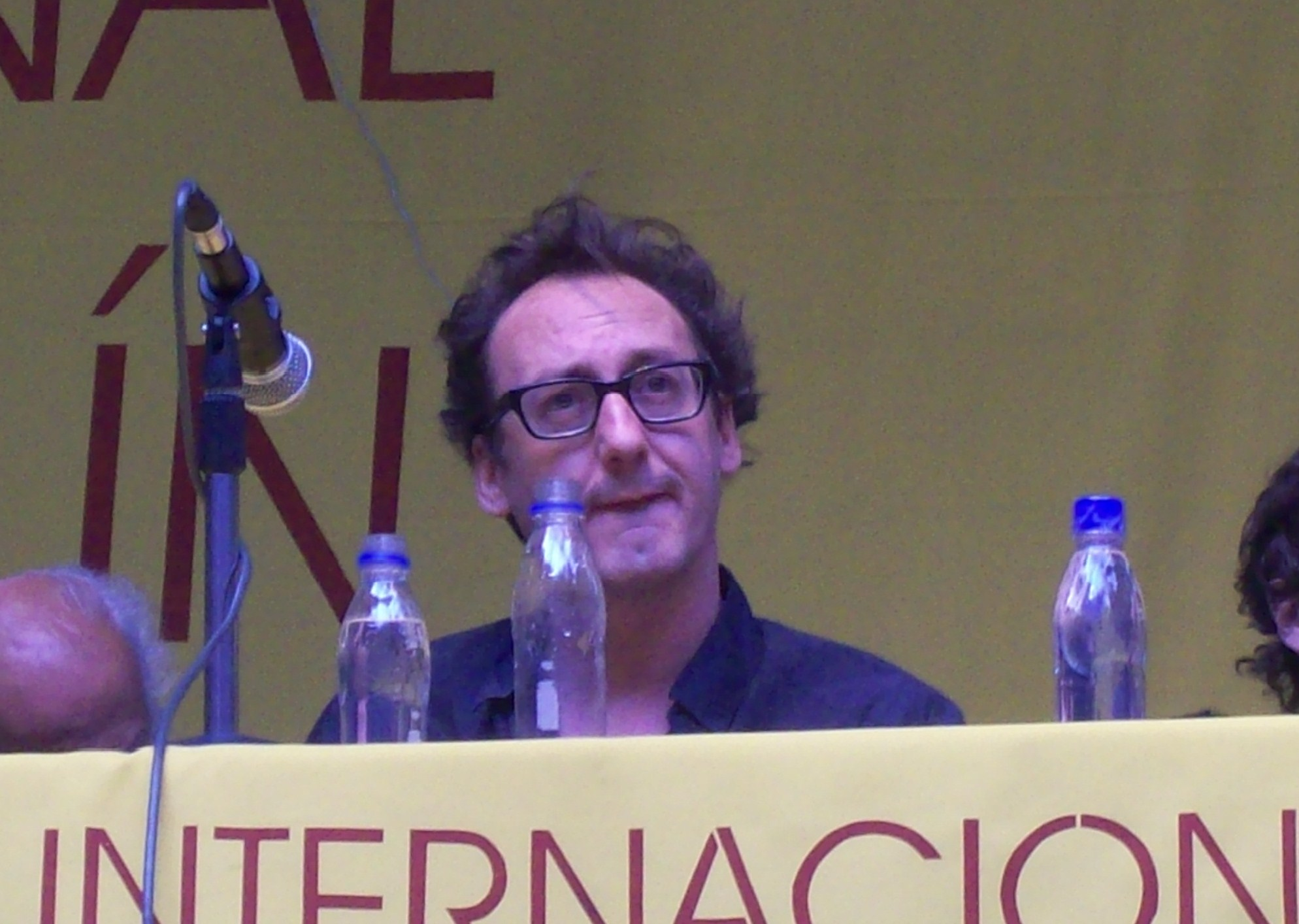 Armin Senser, poeta suizo, en la inauguración del XVIII Festival Internacional de Poesía de Medellín